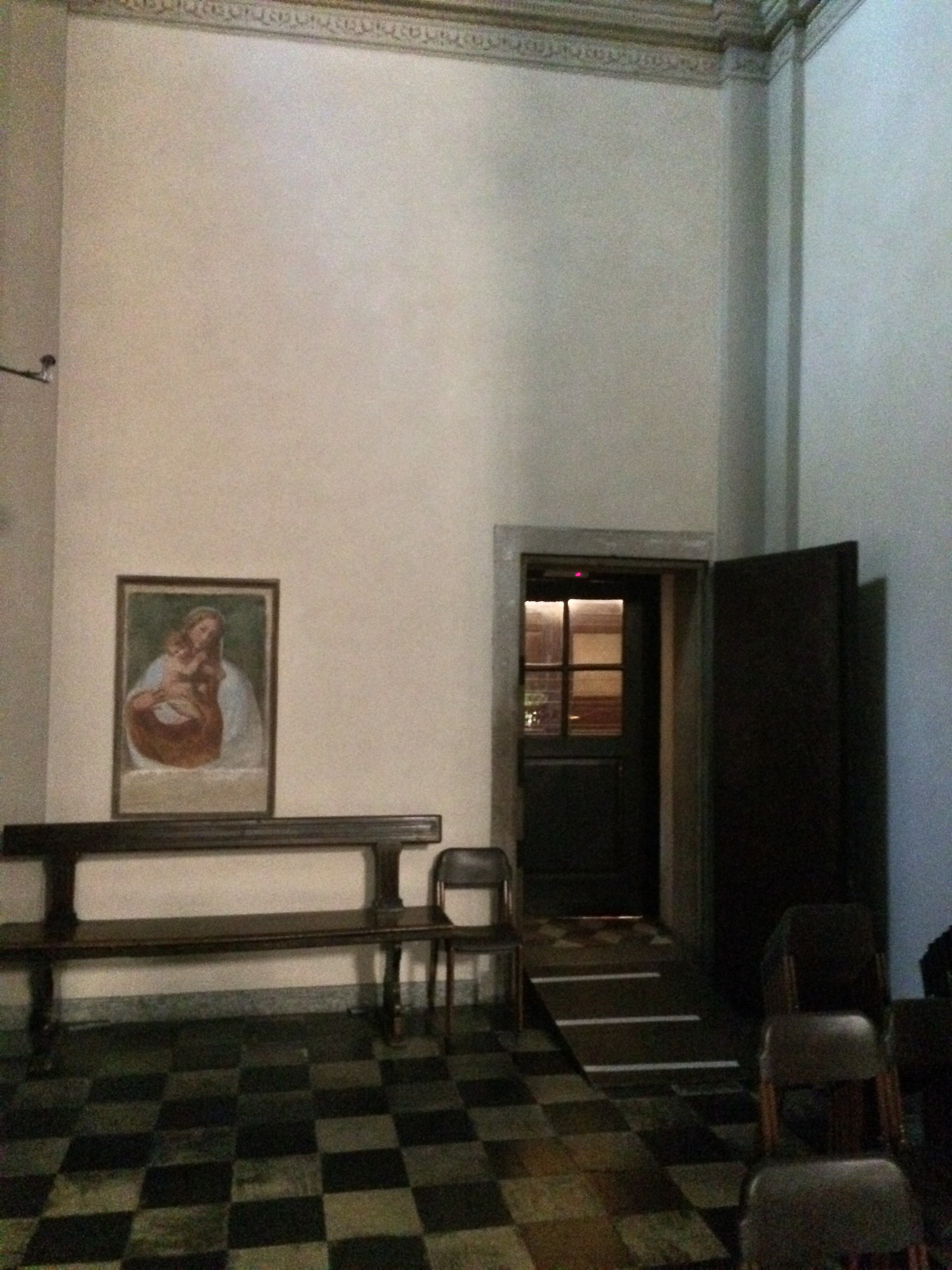 La cappella dell'andito della basilica di San Magno